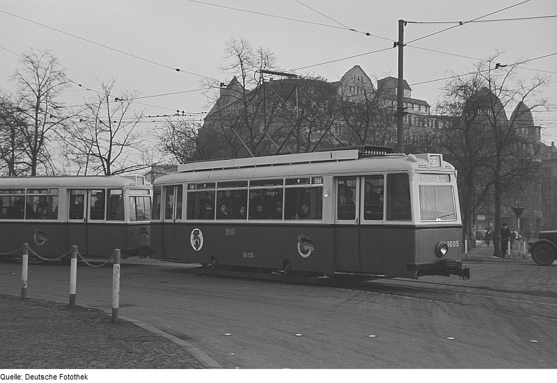 Original image description from the Deutsche Fotothek Straßenbahn an einer Kreuzung in der Innenstadt